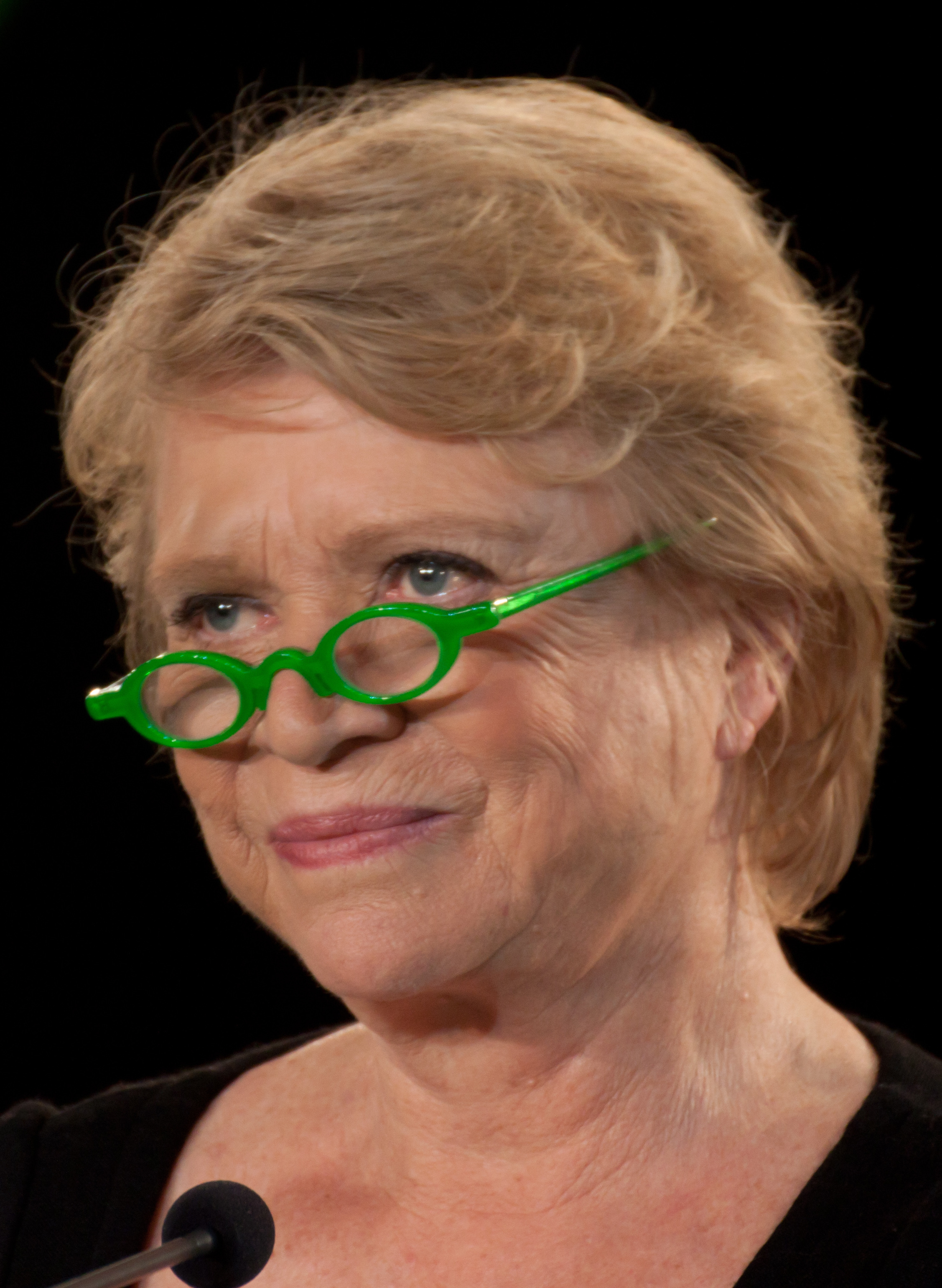 Eva Joly lors de son meeting pour l'élection présidentielle de 2012 à Grenoble